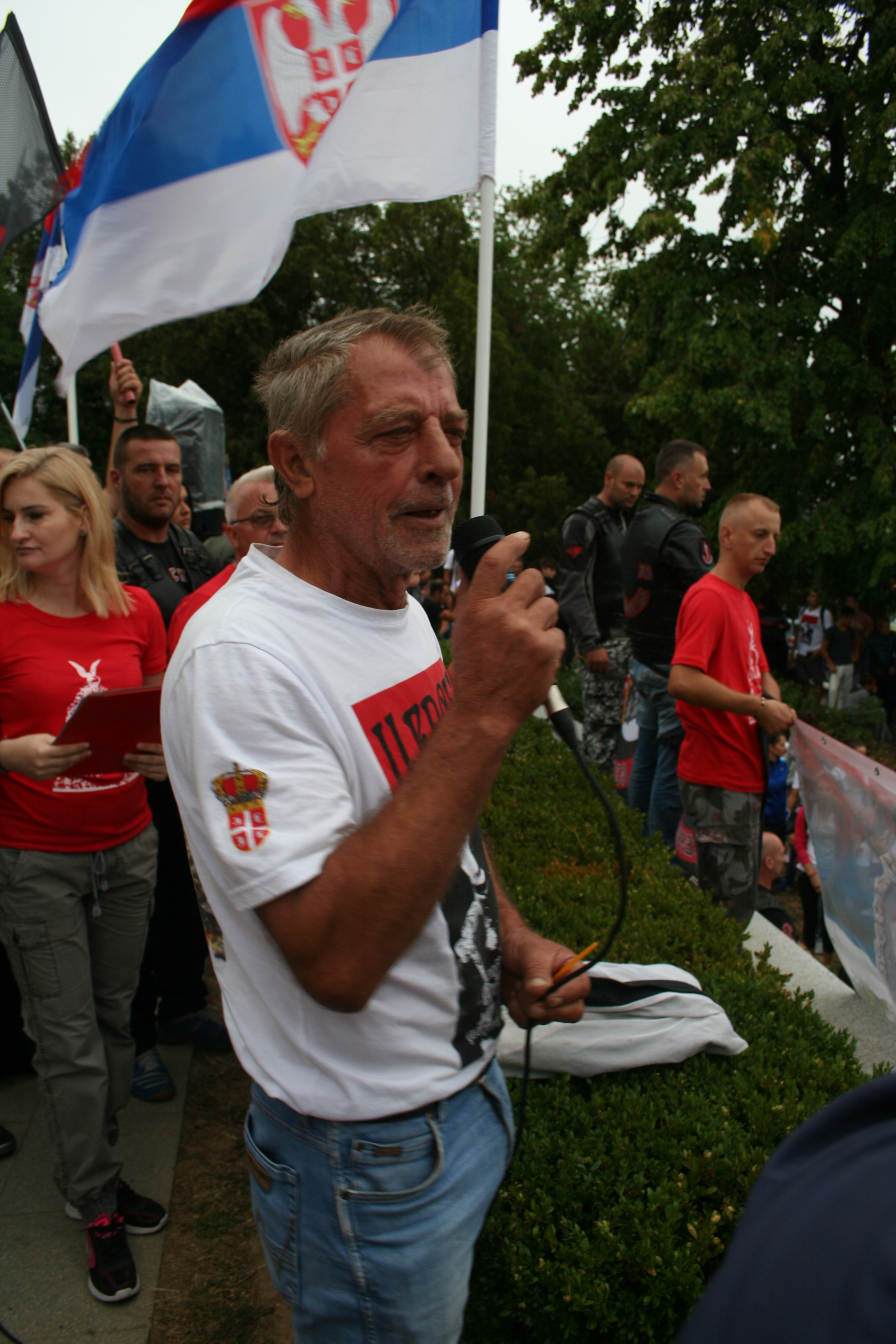 8. Cerski marš - 2017.